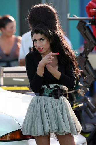 Singer Amy Winehouse